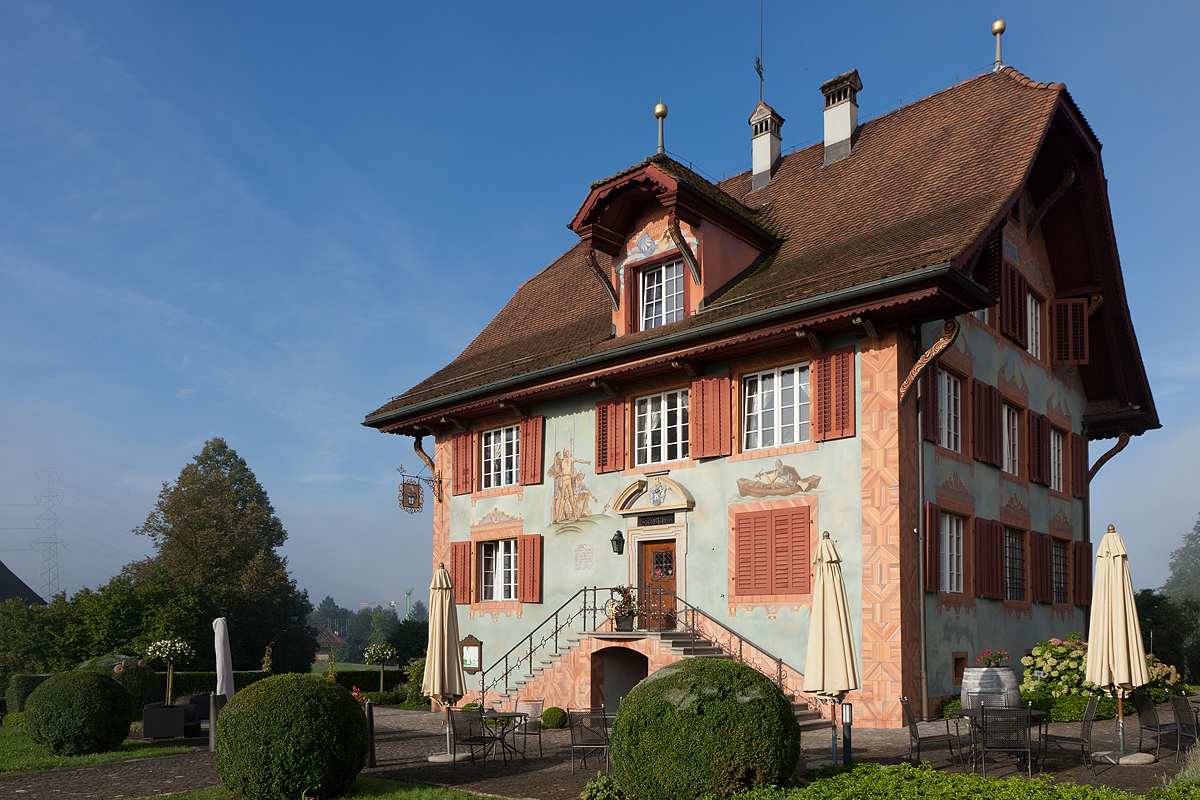 Restaurant Wart (historisches Gebäude) in Hünenberg